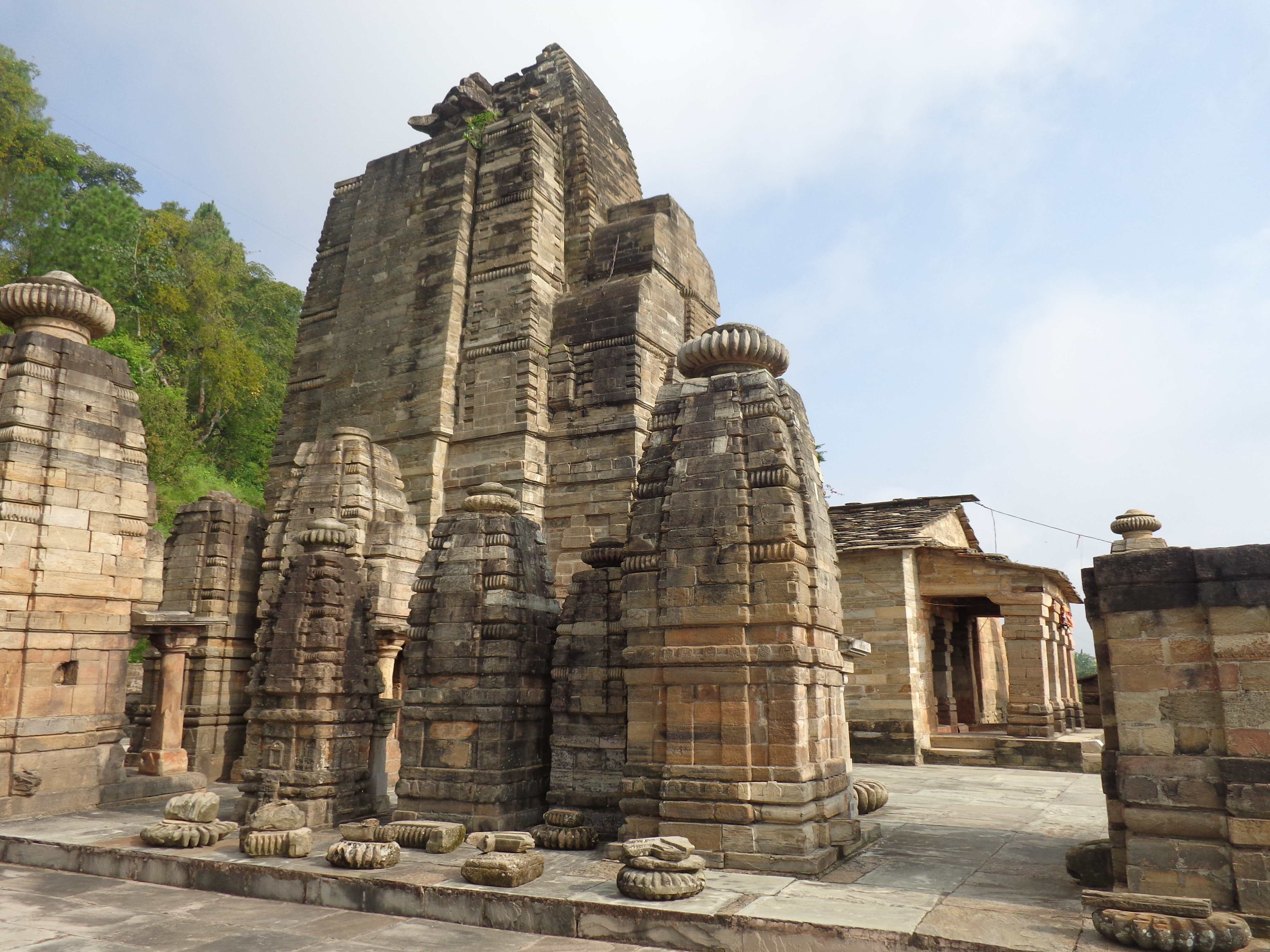 नेपाली: Katar Malla Mandir Katarmall